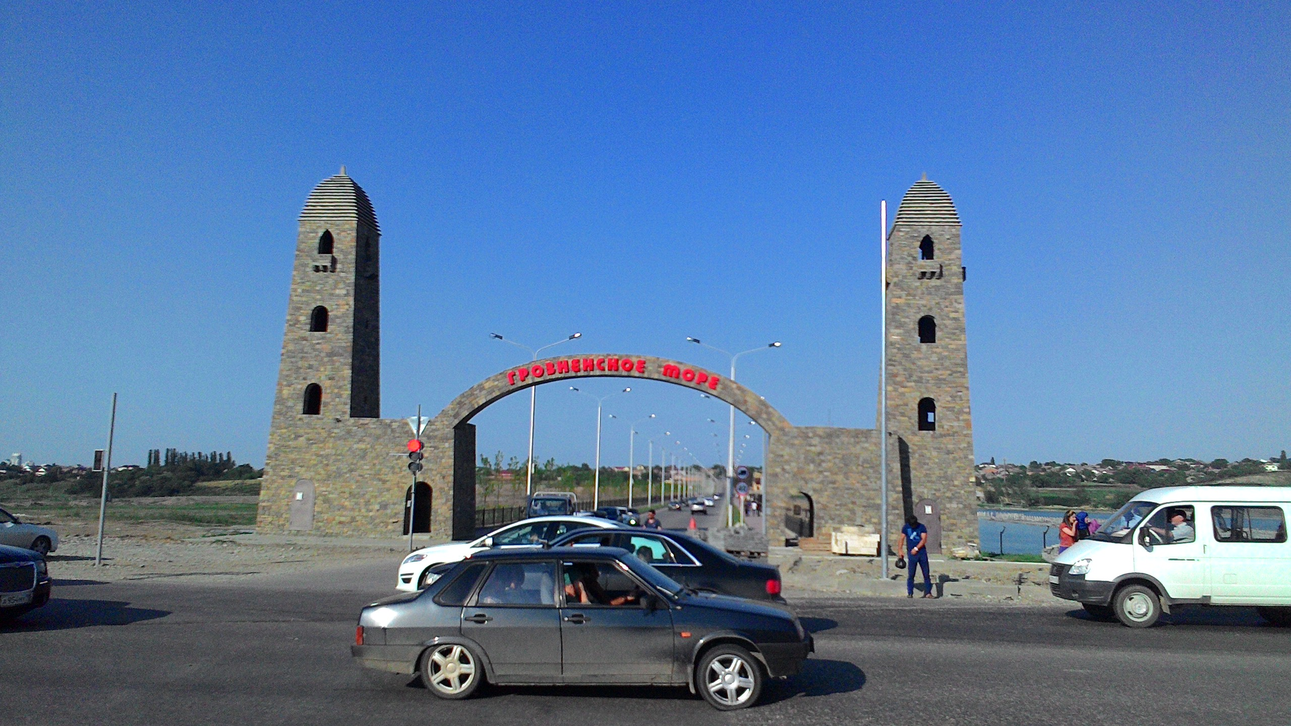 Грозненское море. Въезда на дамбу